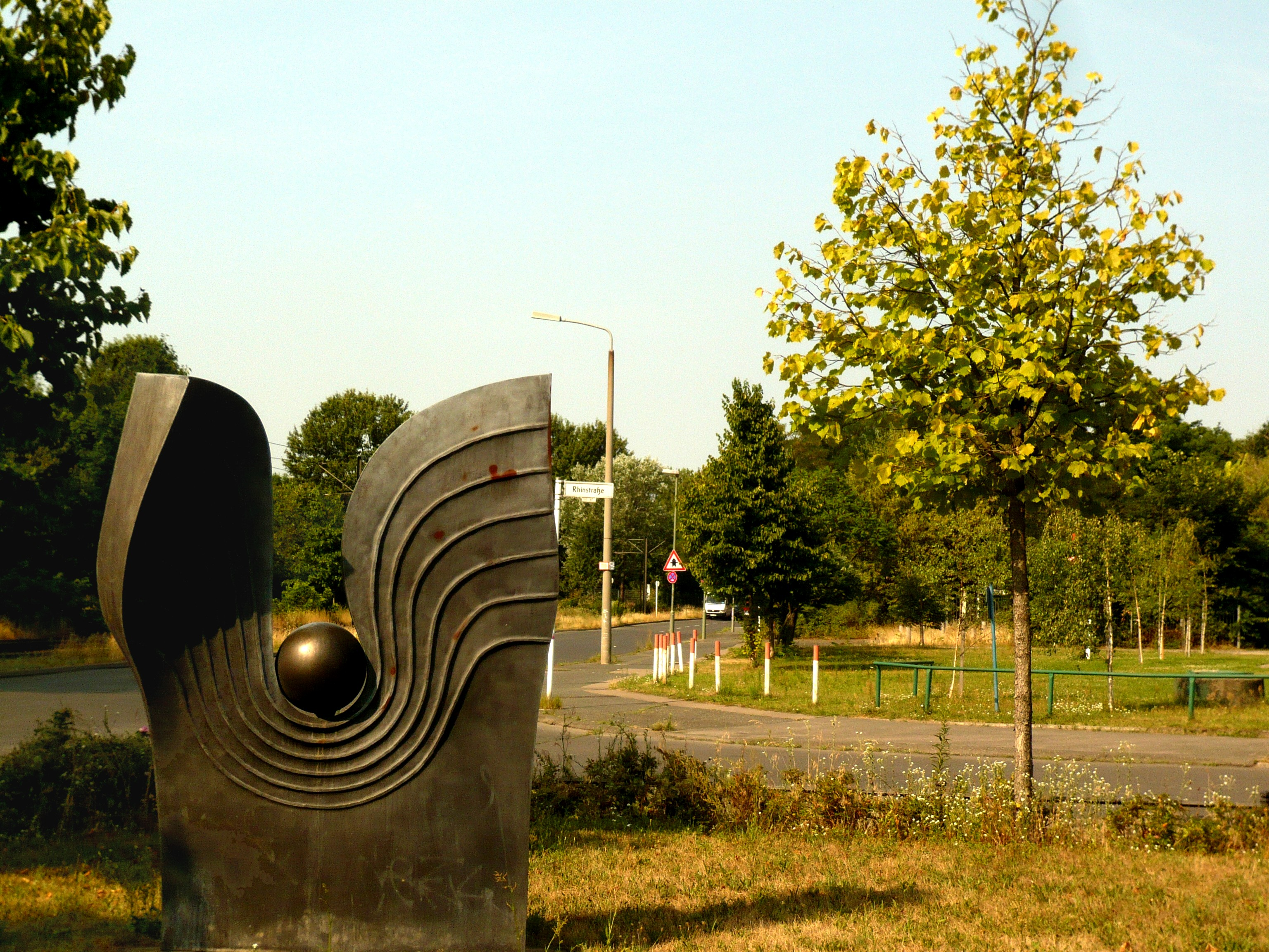 Berlin-Lichtenberg, AdK, Kunstwerk von Jan Skuin